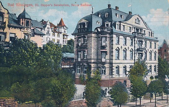 Sanatoriumsanlage Dapper um 1905, vorn Haupt- (rechts, heute Hotel Residenz von Dapper) und Nebengebäude, hinten rechts "Neues Kurhaus" (Haus 4)